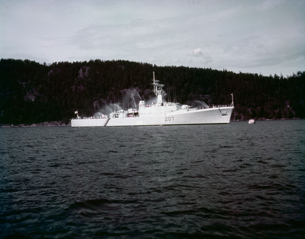 HMCS Skeena 1957.